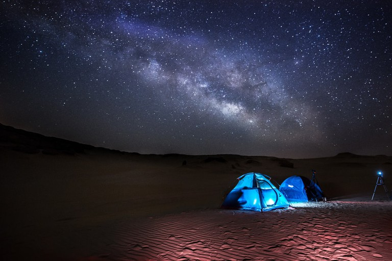 صفاء السماء بنجومها في صحراء الفيوم